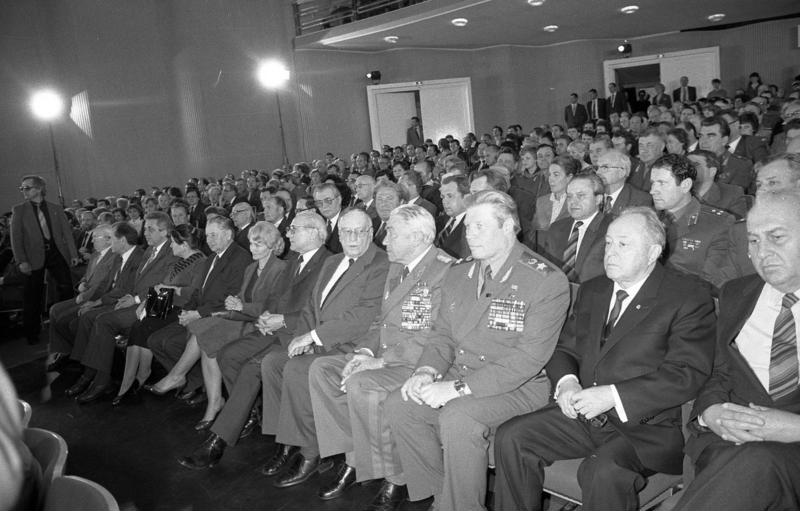 Berlin, Filmpremiere "Der Sieg" im Filmtheater "Kosmos" ADN-ZB/Reiche 3.5.82 Berlin: Erstaufführung Der in Koproduktion UdSSR-DDR entstandene Spielfilm "Der Sieg" hatte seine festliche DDR-Erstaufführung. Im Filmtheater "Kosmos" wurden der Generalsekretär des ZK der SED und Vorsitzende des Staatsrates der DDR, Erich Honecker, un die Mitglieder des Politbüros des ZK der SED Kurt Hager (4.v.r.), Joachim Hermann (".v.r.), Armeegeneral Heinz Hoffmann (3.v.r.), Egon Krenz (3.v.l.), Armeegeneral Erich Mielke (r.), Erich Mückenberger (L.) herzlich begrüßt. 5.v.l. UdSSR-Botschafter Wjatscheslaw Kotschemassow, 2.v.r. Armeegeneral Michail Saizew, Oberkommandierender der GSSD, 6.v.r. Margot Honecker, Mitglied des ZK der SED. Abgebildete Personen: Mielke, Erich: Minister für Staatssicherheit, Armeegeneral, Politbüro des Zentralkomitees (ZK) der SED, DDR (GND 118977490) Honecker, Erich: Staatsratsvorsitzender, Generalsekretär des ZK der SED, DDR (GND 118553399) Hager, Kurt: Mitglied des Politbüros des ZK der SED, Staatsratsmitglied, DDR (GND 119385511) Hoffmann, Heinz: Minister für Nationale Verteidigung, Mitglied des ZK der SED, DDR Kotschemassow, Wjatscheslaw I.: Botschafter in der DDR, Sowjetunion Saizew, Michael: General, Oberkommandierender der Gruppe der sowjetischen Streitkräfte in Deutschland (GSSD), Sowjetunion